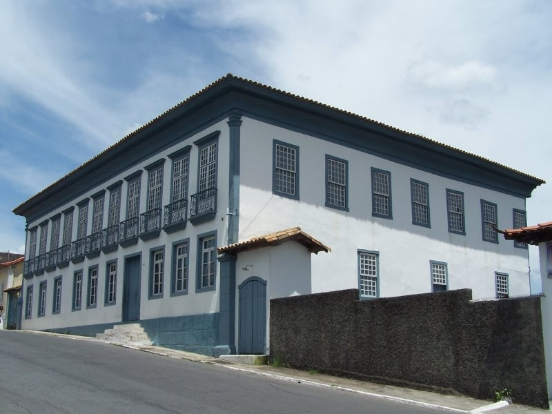 Solar da Baronesa em Santa Luzia, Minas Gerais, Brasil.